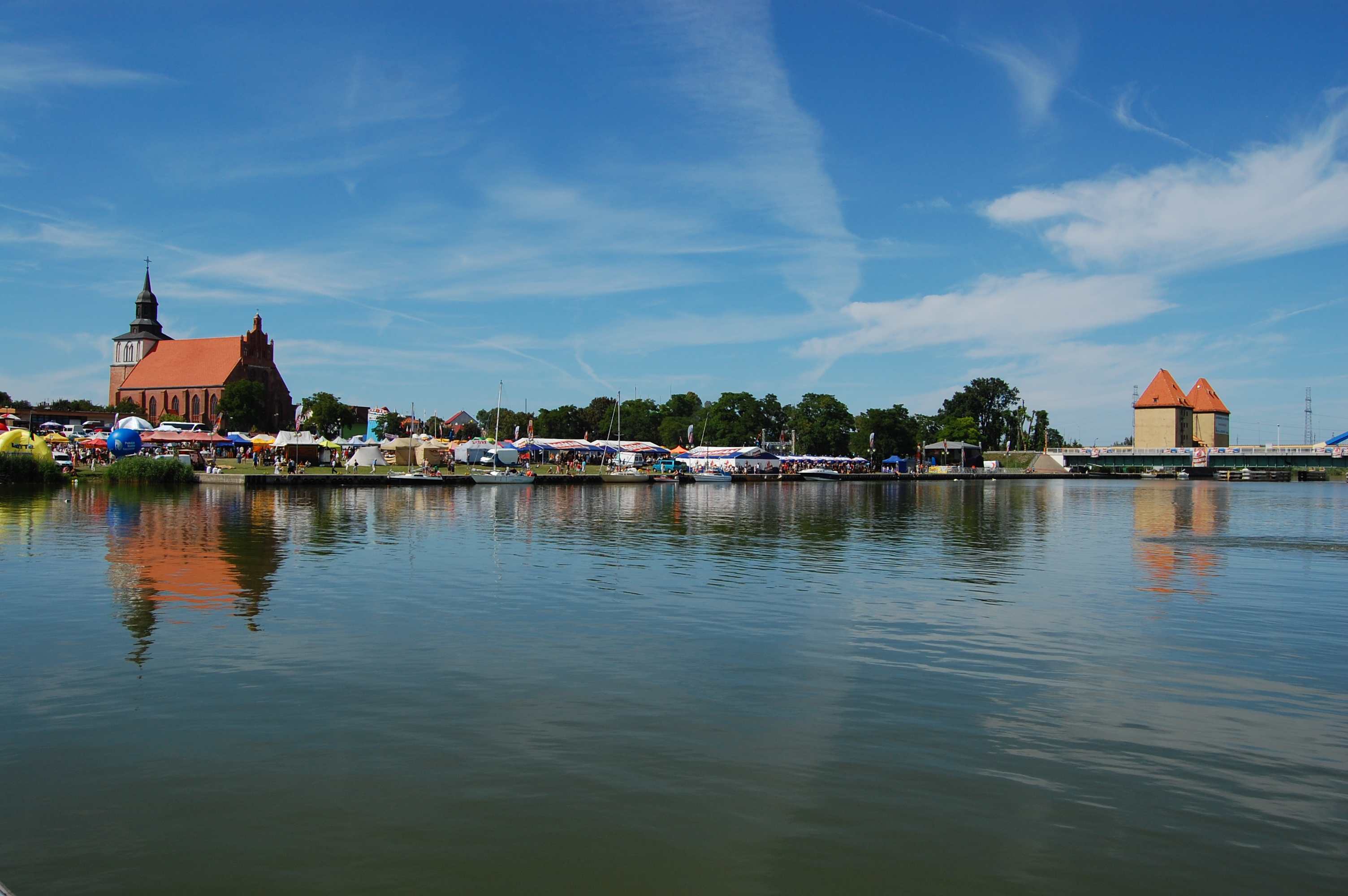 XV Festiwal Słowian i Wikingów w 2009 roku